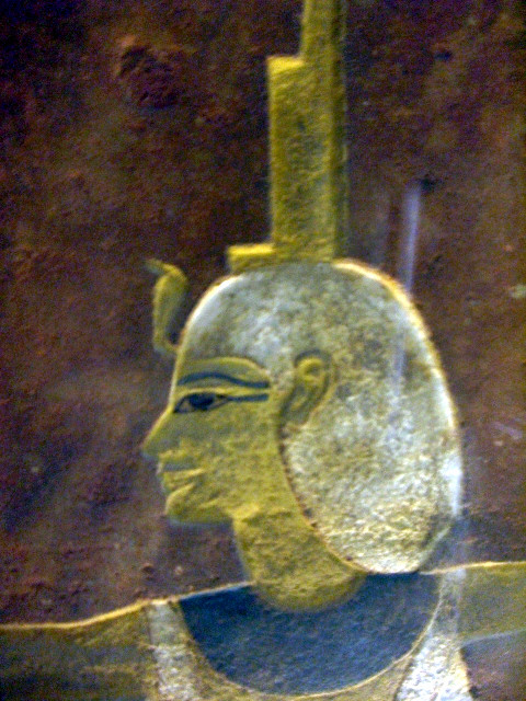 Représentation d'Isis sur le sarcophage de Thoutmosis IV - XVIIIe dynastie - Vallée des Rois